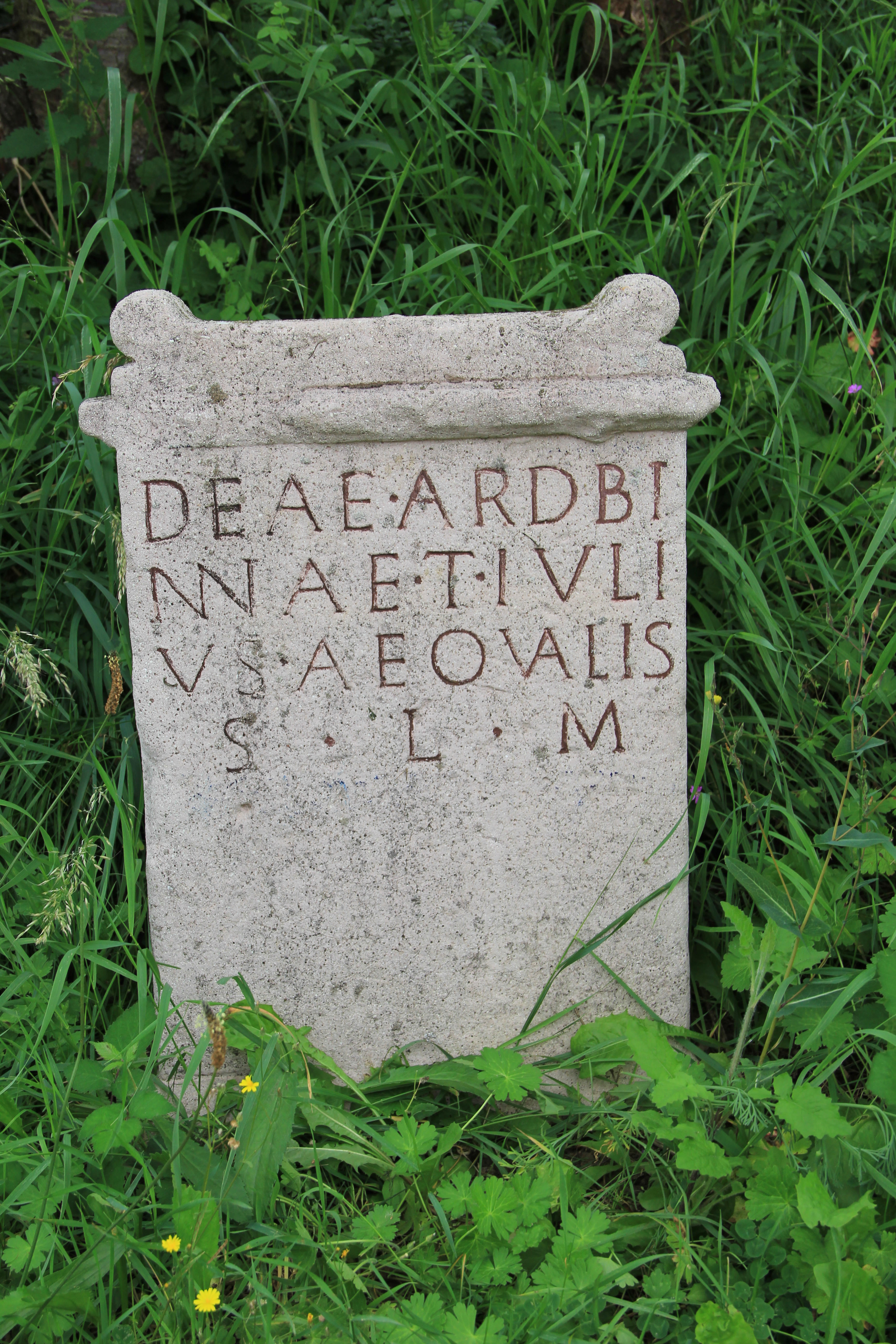 Zülpich, Landesgartenschau 2014 (Park am Wallgraben); Abguss eines römischen Weihesteins. der Stein wurde 1859 bei Gey, Gemeinde Hürtgenwald bei Feldarbeiten gefunden. Das Original befindet sich im rheinischen Landesmuseum Bonn. Die Inschrift lautet: "Der Göttin Ardbinna. Titus Julius Aequalis. Er hat das Gelübde nach Gebühr erfüllt." Ardbinna oder Arduinna war die Schutzgöttin der Eifel-Region und wurde in römischer Zeit mit Diana gleichgesetzt.CIL XIII 7848: Deae Ard i/nnae T(itus) Iuli/us Aequalis / s(olvit) l(ibens) m(erito)